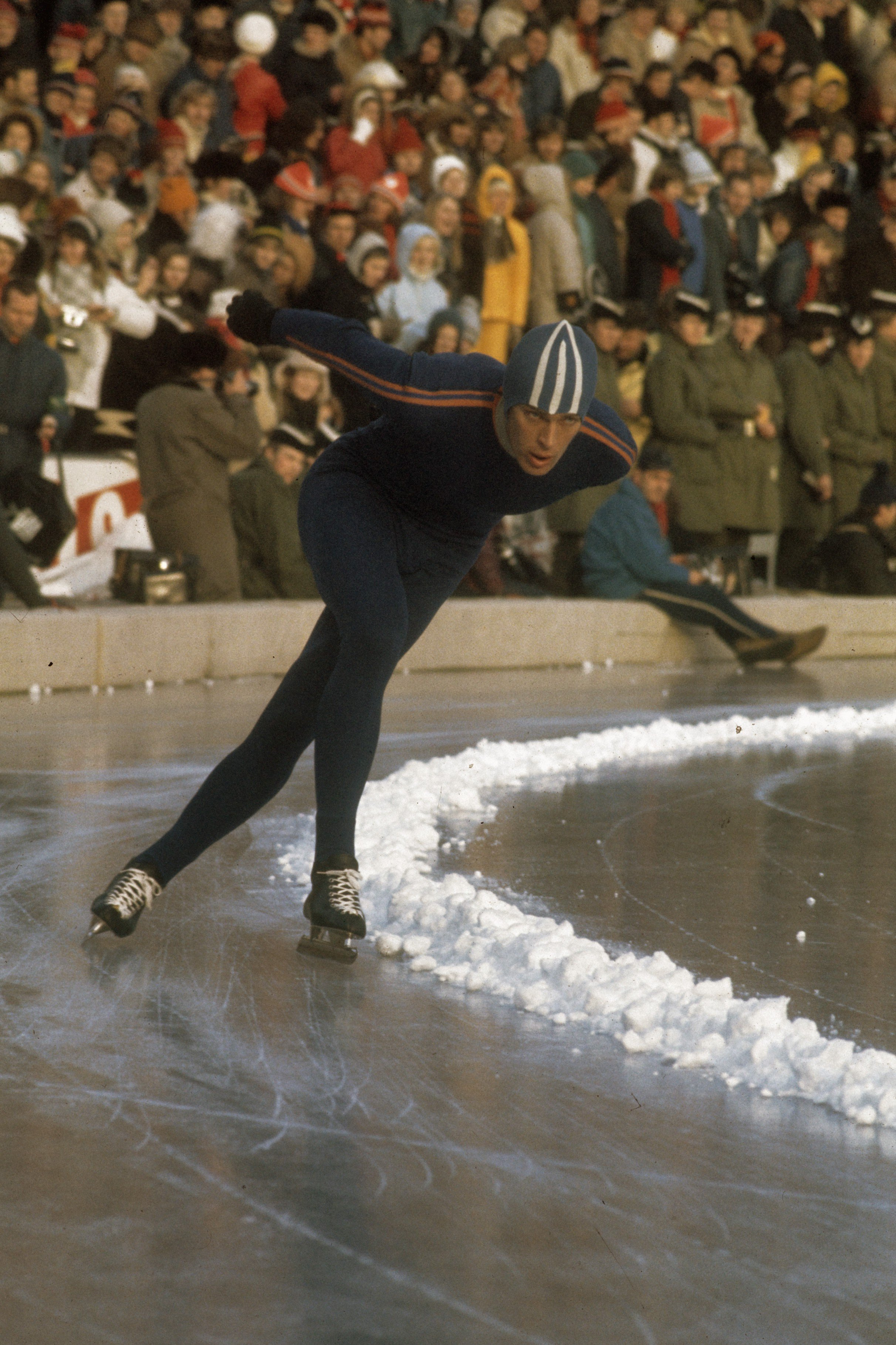 Collectie / Archief : Fotocollectie Anefo Reportage / Serie : [ onbekend ] Beschrijving : Wereldkampioenschappen schaatsen mannen allround in Oslo. Ard Schenk in actie Datum : 20 februari 1972 Locatie : Noorwegen, Oslo Trefwoorden : schaatsen, schaatsers, sport Persoonsnaam : Schenk, Ard Fotograaf : Verhoeff, Bert / Anefo Auteursrechthebbende : Nationaal Archief Materiaalsoort : Dia (kleur) Nummer archiefinventaris : bekijk toegang 2.24.01.06 Bestanddeelnummer : 254-9161